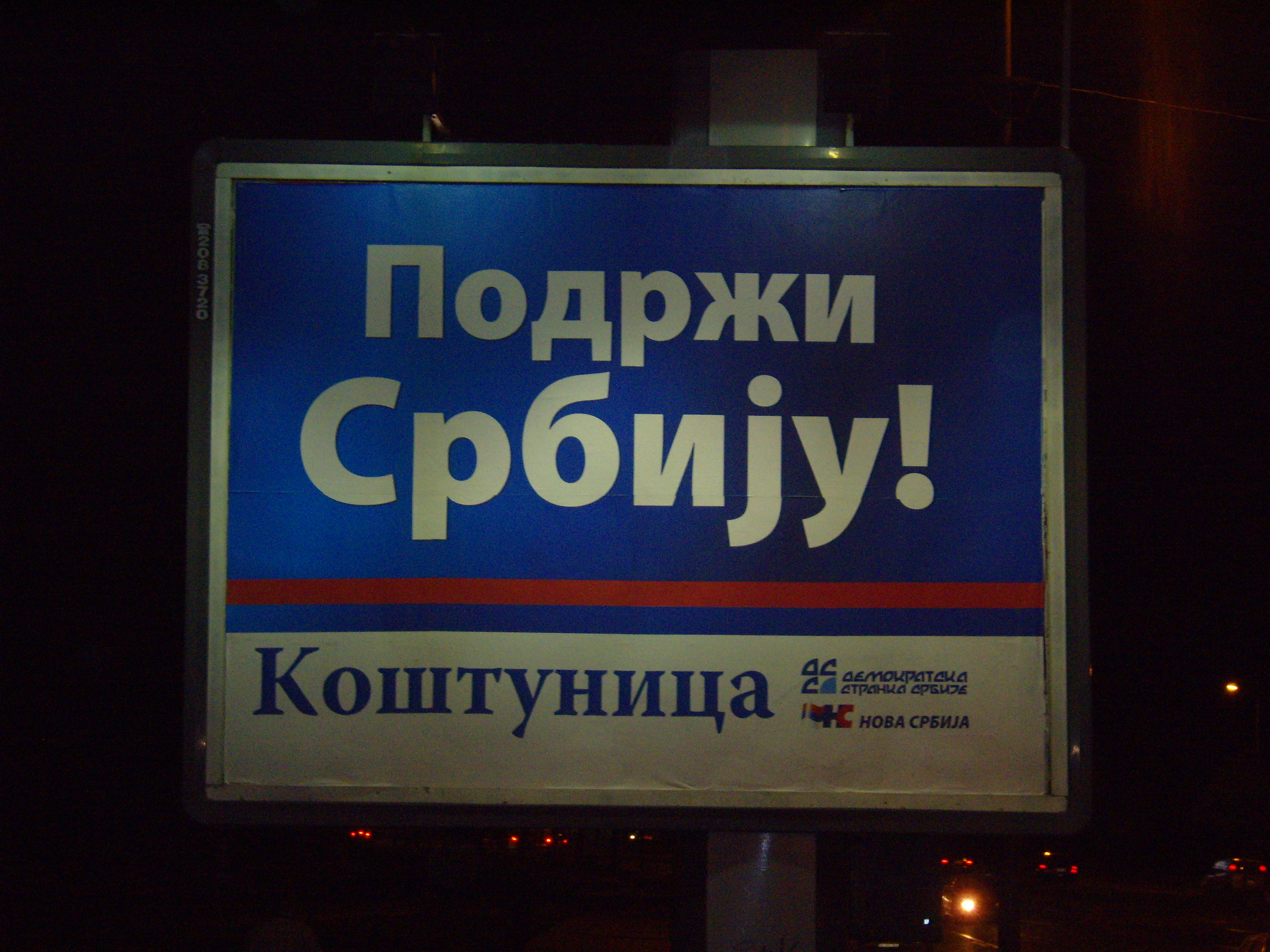 Political propaganda in Serbia near Ada Ciganlija 4 (2008-04-14)